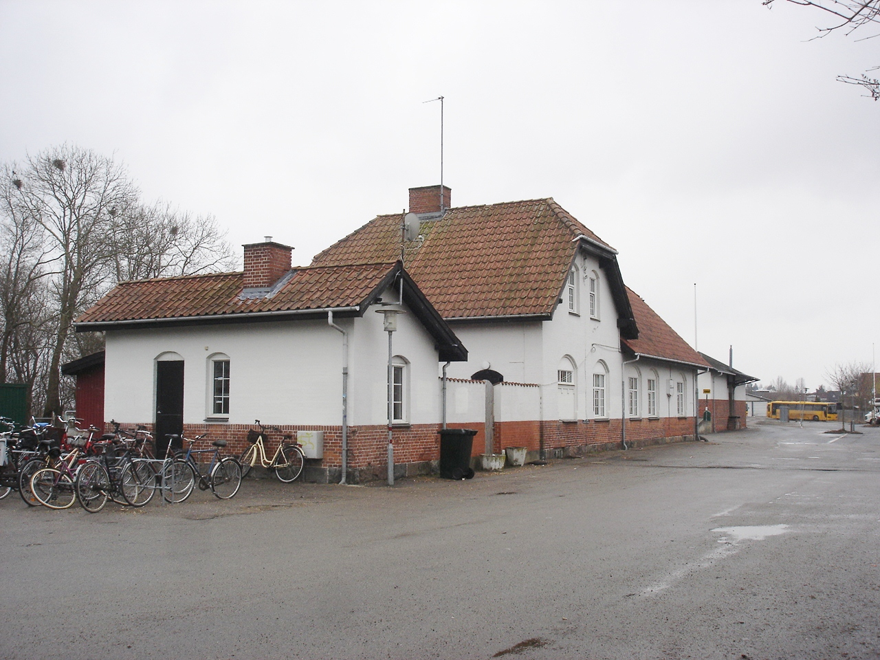 Hørve Station, vejsiden fra S - ved cykelstativerne lå Hørve-Værslev Jernbanes drejeskive